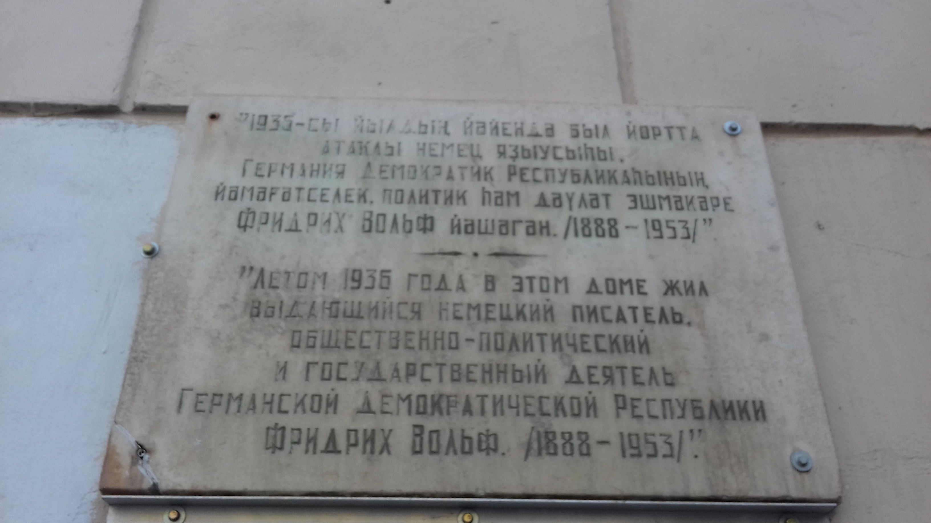 Мемориальная доска (Фидрих Вольф) на ул.К.Маркса 17/19 (Уфа)